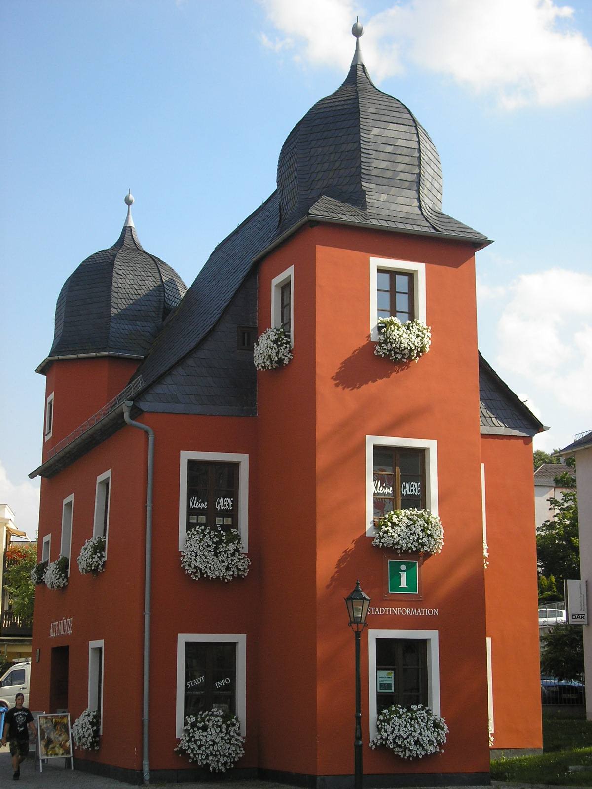 Das Gebäude der Alten Münze in Schleiz (Thüringen).